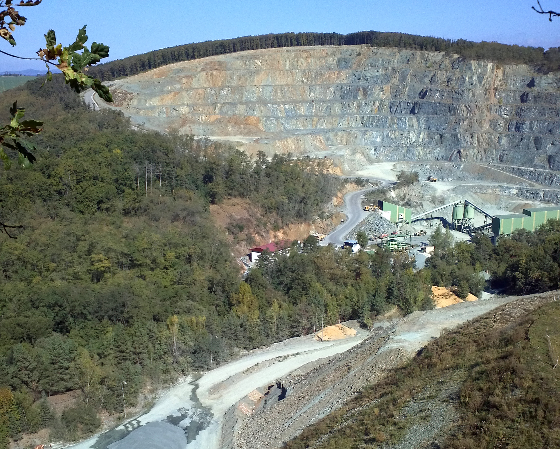 Želešice - kamenolom.